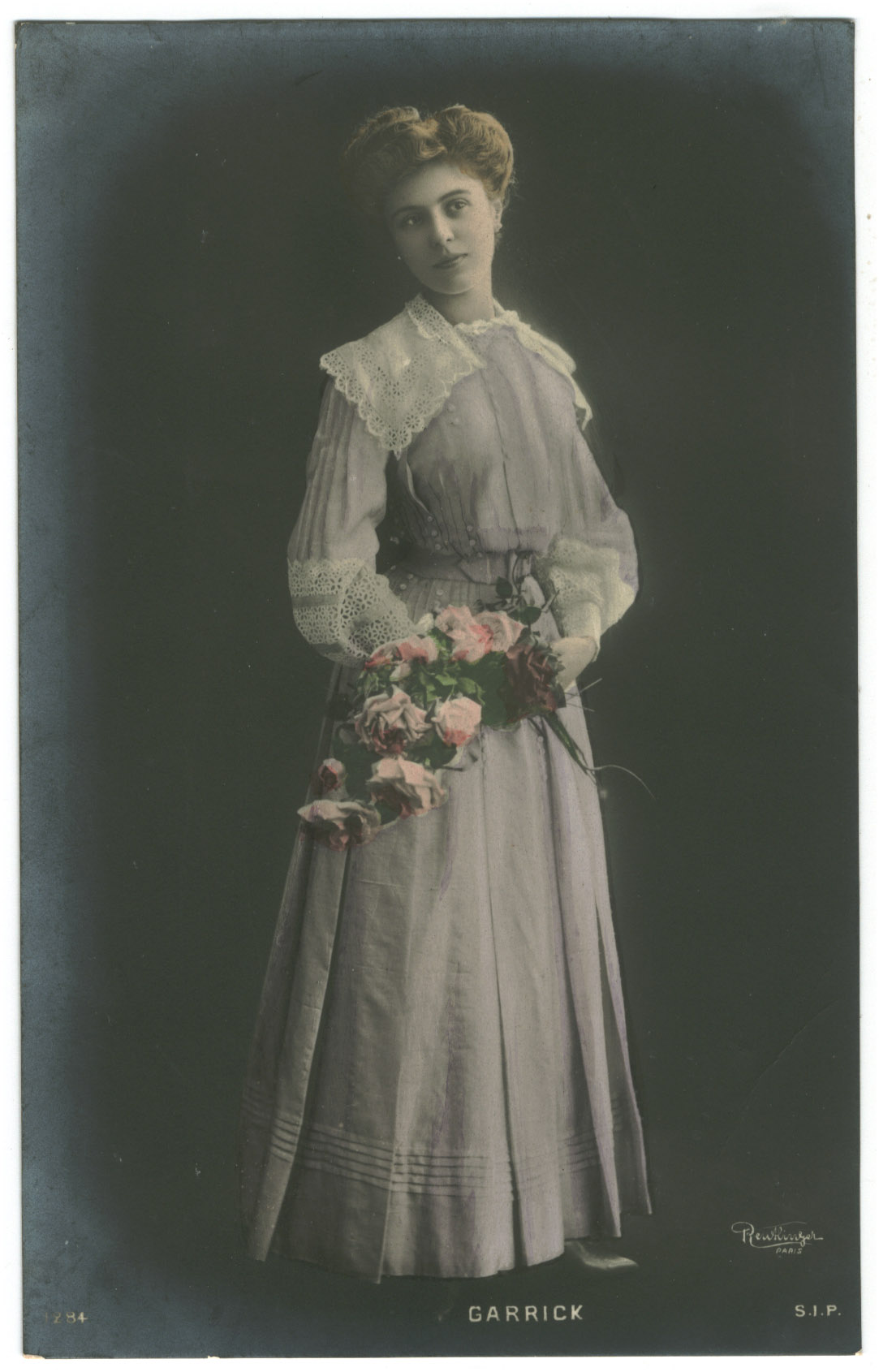 GARRICK, Yvonne_SIP. 1284. Photo Reutlinger